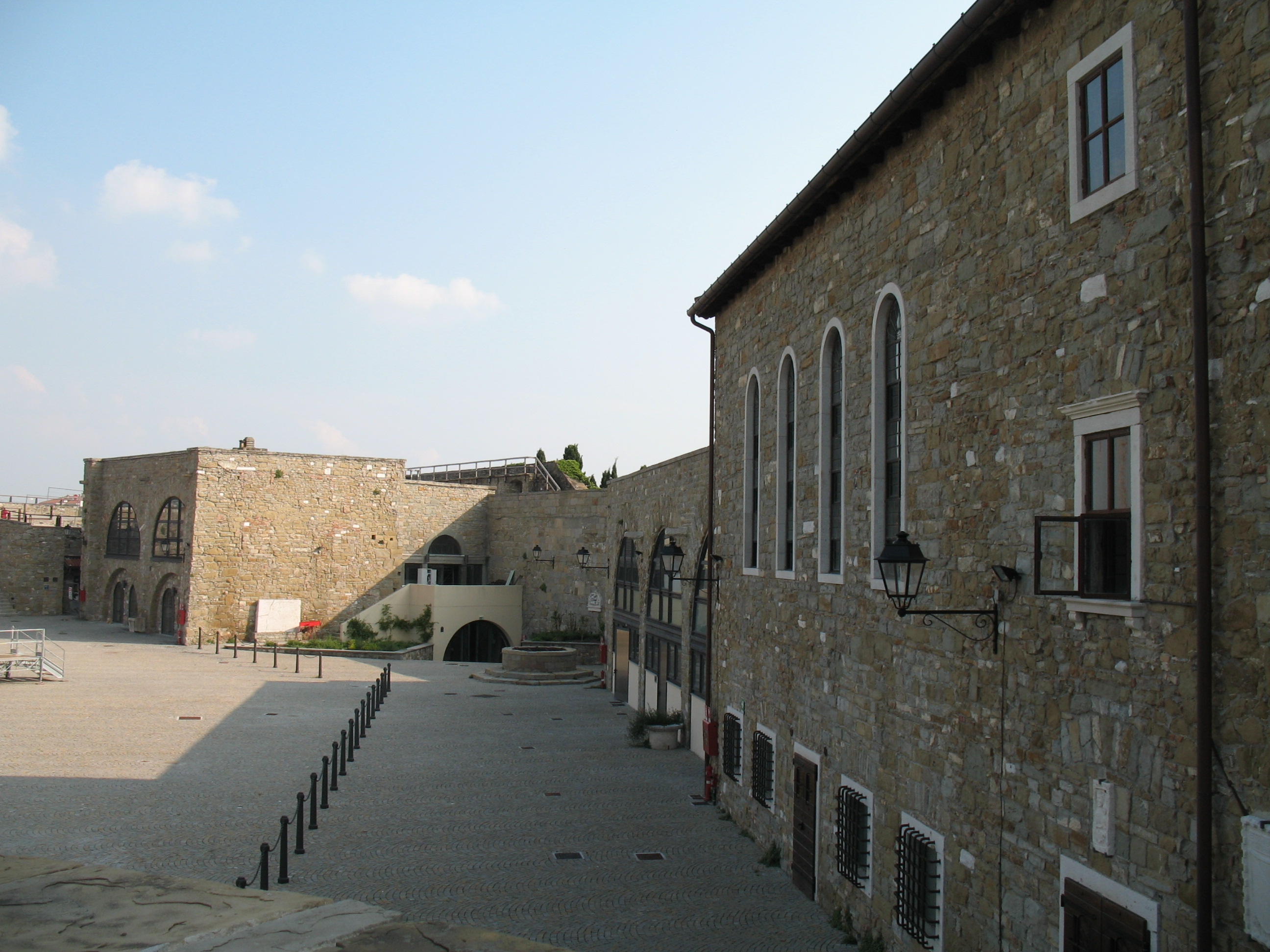 Immagine da Trieste - Castello di San Giusto.